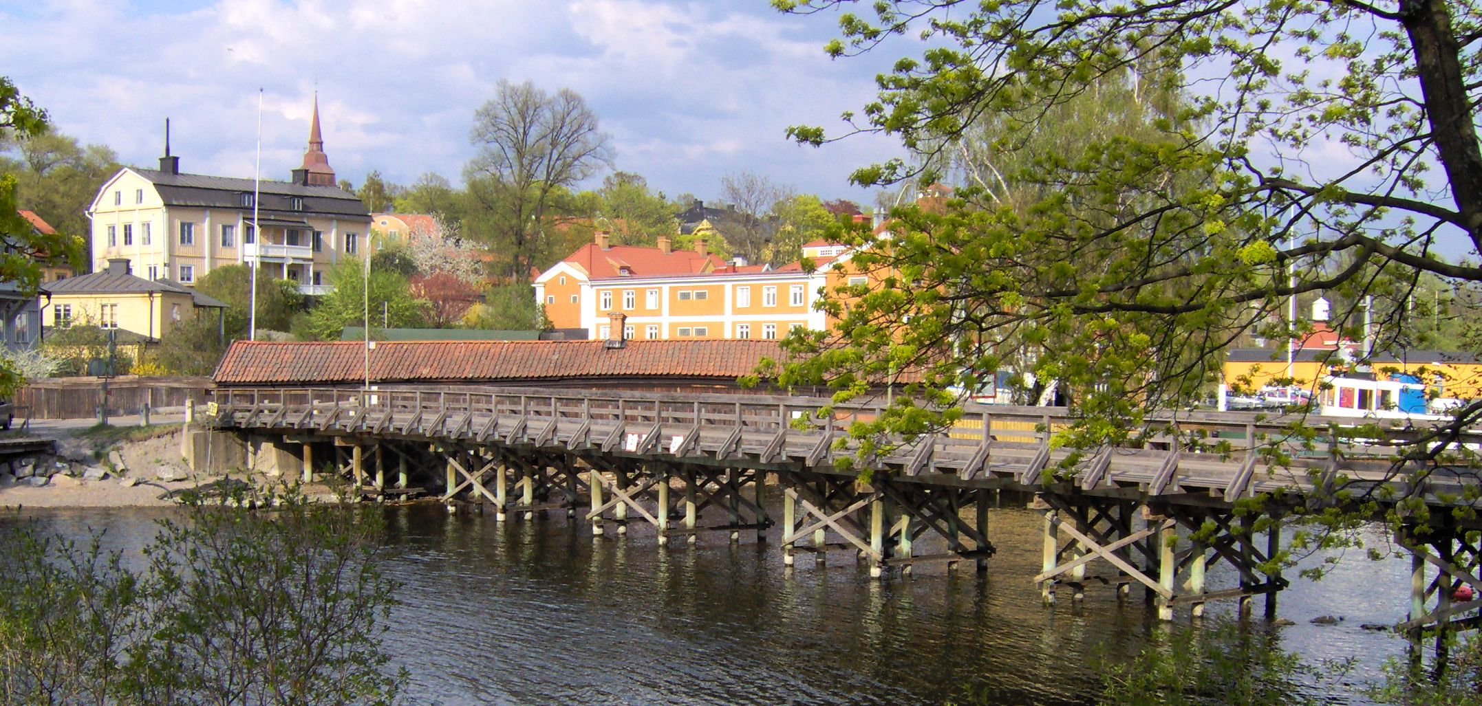 Beckholmsbron mellan Djurgården och Beckholmen sedd från Beckholmen över Beckholmssundet. Beckholmsbron crossing beckholmssundet between Beckholen and Djurgården. 2006.